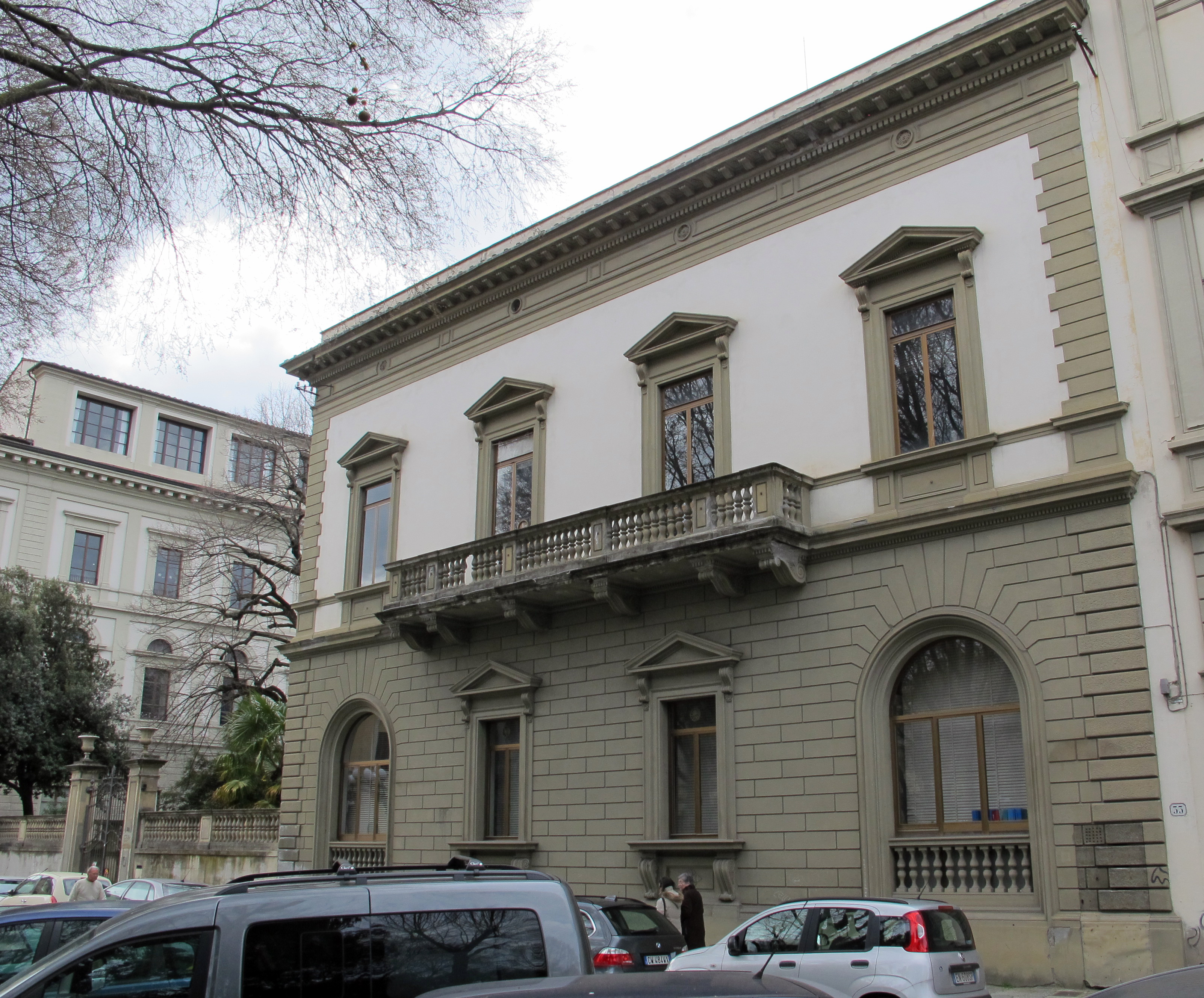 Piazza d'azeglio 30-33 villa sepp